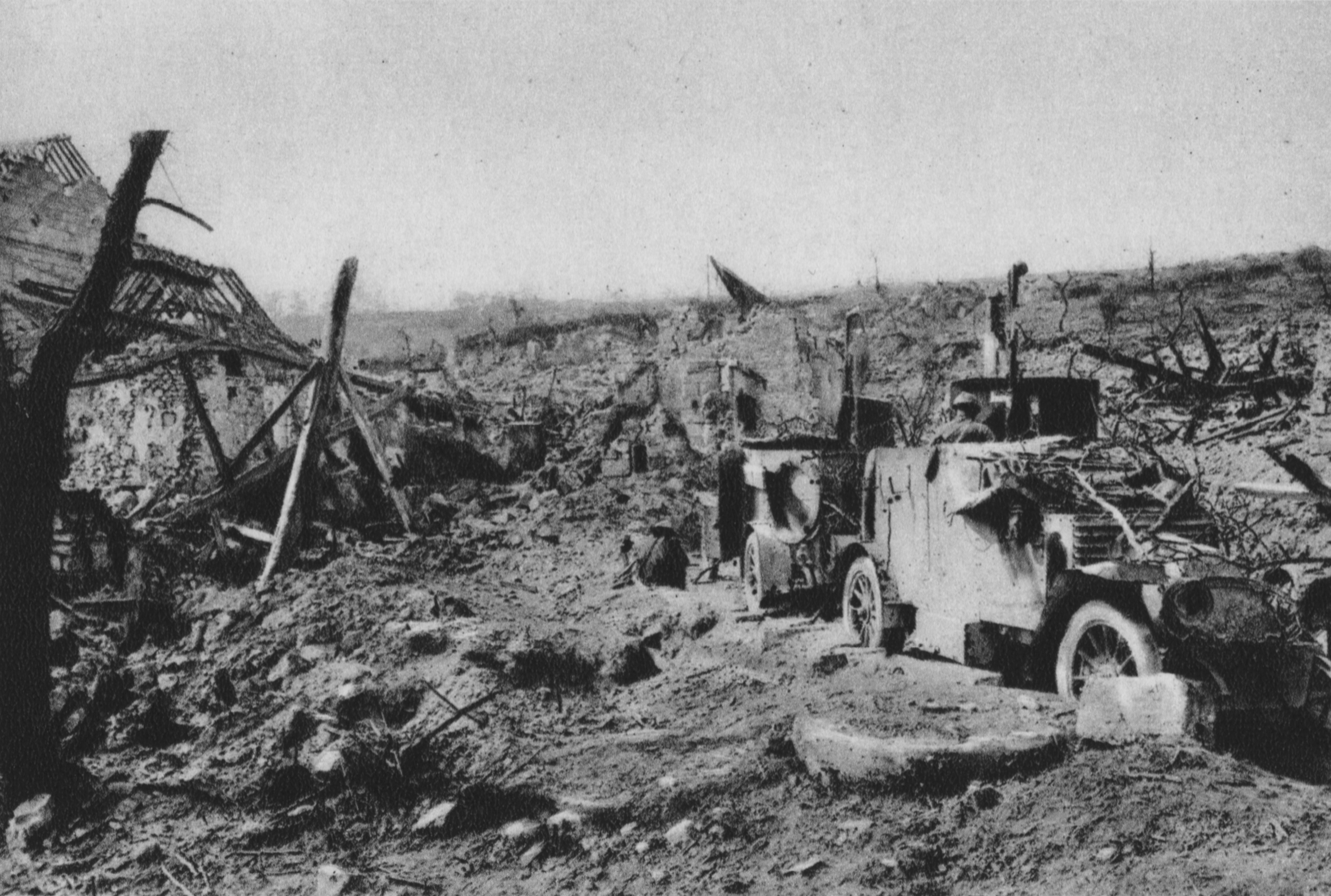 Panzerwagen mit aufmontierten Machinengewehren erwarten in den Ruinen von Chavonne das Erscheinen deutscher Flugzeuge (1. Mai 1917).